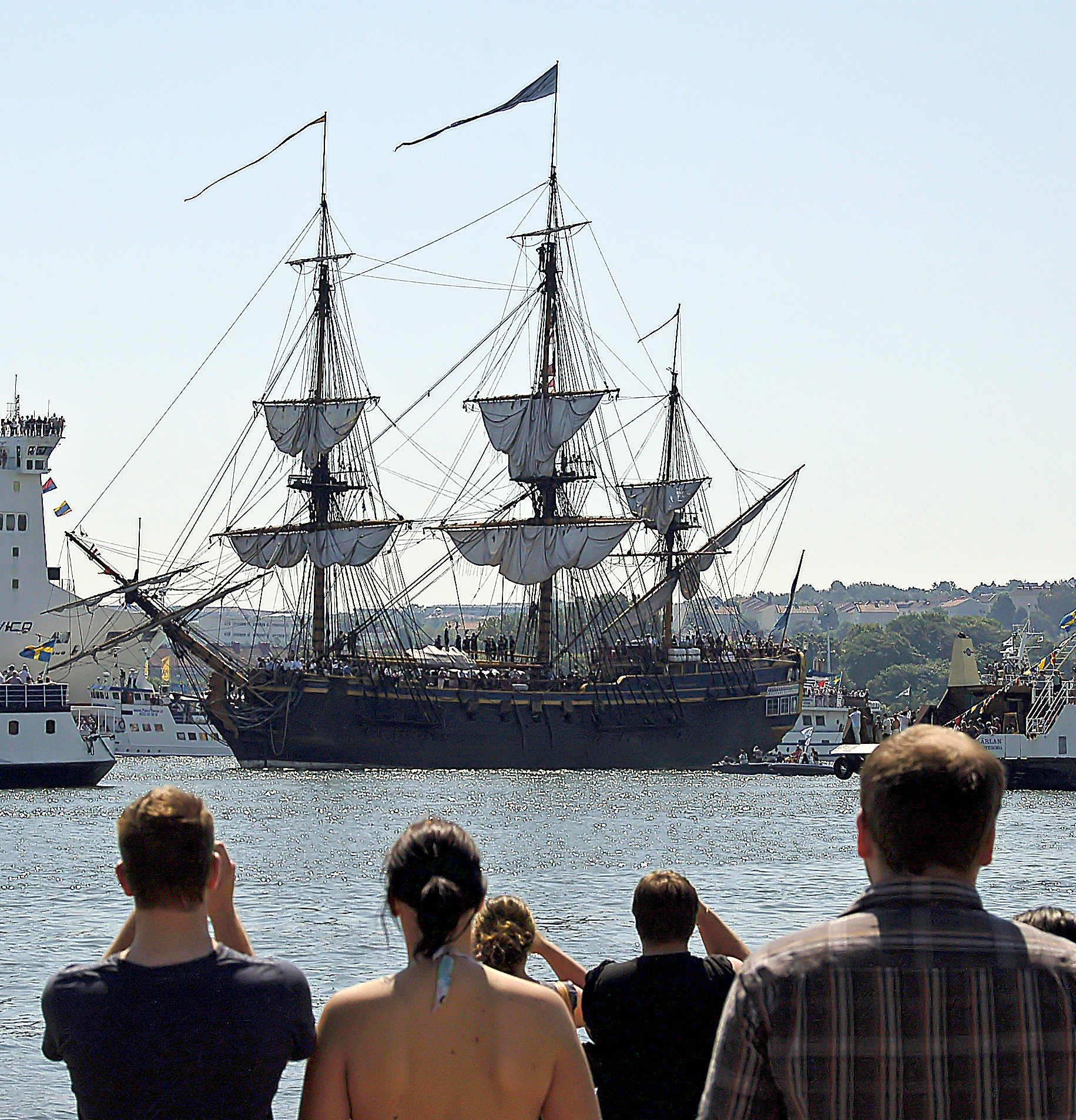 Ostindiefararen Götheborg vid hemkomsten